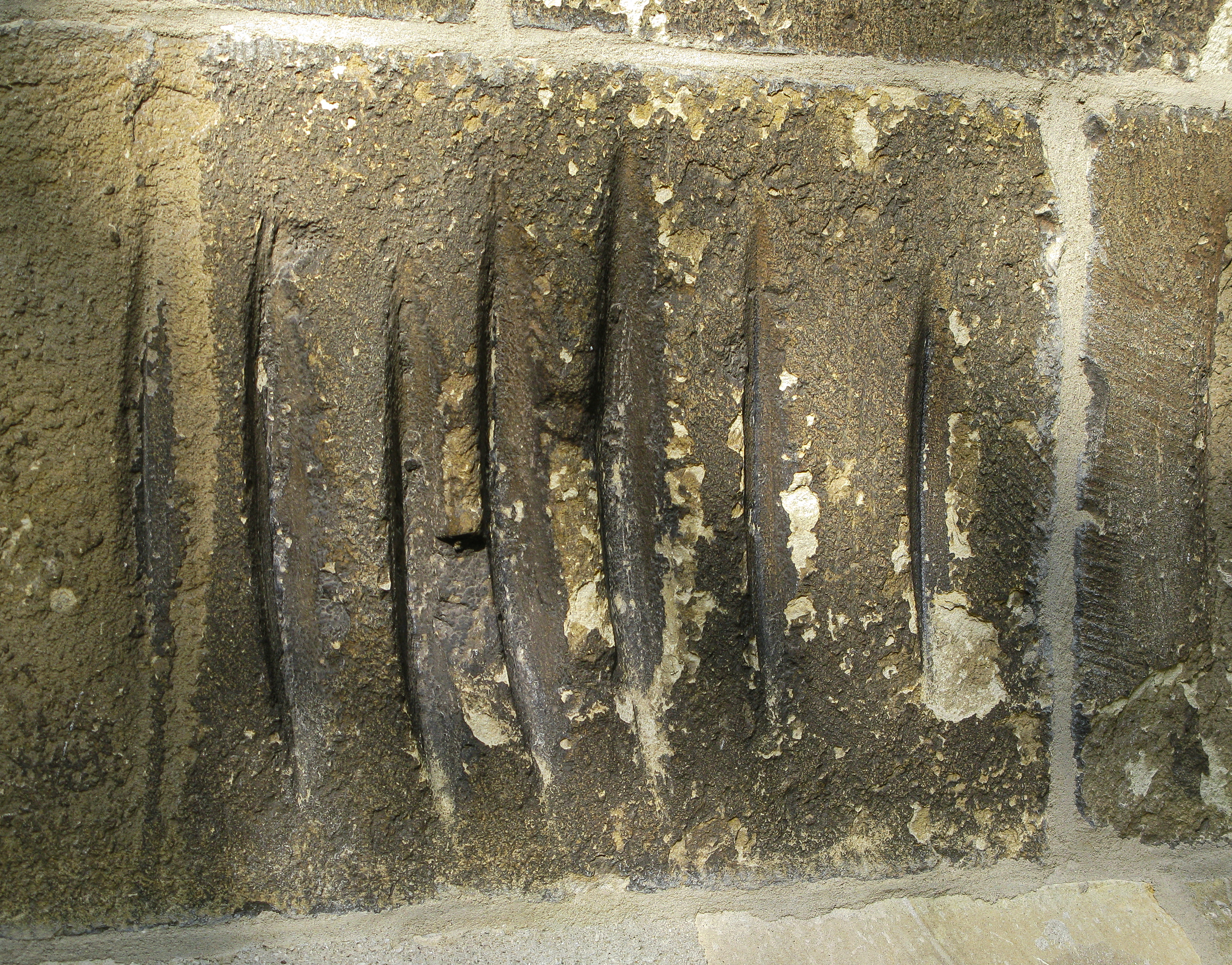 Pestrillen/Schleifrillen im hinteren Bereich (Chor) der St.-Viktor-Kirche, Dülmen, Nordrhein-Westfalen, Deutschland This image shows a heritage building in Germany, located in the North Rhine-Westphalian city Dülmen (no. 15).